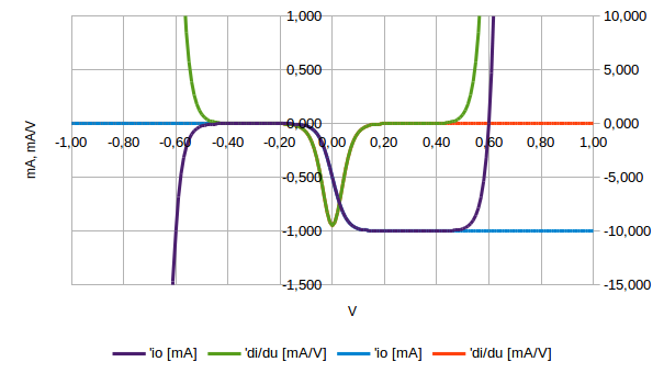 Diagramm: Ausgangsstrom und Ausgangsleitwert über die eingeprägte Ausgangsspannung (in [V]) des Aktivteiles eines Differenzverstärker-Oszillators, sowohl mit als auch ohne Berücksichtigung des Stromes über die Basis-Kollektor-Dioden. Das Diagramm wurde mit LibreOffice Calc erstellt unter Verwendung der Gleichung: I o = 1 2 ∗ I e ∗ 1 − e U o n ∗ U T 1 + e U o n ∗ U T + I S ∗ ( e U o n ′ ∗ U T − e − U o n ′ ∗ U T ) − 1 2 ∗ I e {\displaystyle I_{\text{o ={\frac {1}{2 *I_{\text{e *{\frac {1-e^{\frac {U_{\text{o }{n*U_{\text{T }{1+e^{\frac {U_{\text{o }{n*U_{\text{T +I_{\text{S *\left(e^{\frac {U_{\text{o }{n'*U_{\text{T -e^{\frac {-U_{\text{o }{n'*U_{\text{T \right)-{\frac {1}{2 *I_{\text{e } mit: Betriebsstrom des Oszillators I e = 1 m A {\displaystyle I_{\text{e =1\mathrm {mA} } Sättigungssperrstrom (kurz: Sperrstrom) I S ≈ 10 − 12 … 10 − 6 A {\displaystyle I_{\text{S \approx 10^{-12}\dots 10^{-6}\mathrm {A} } Emissionskoeffizient n , n ′ ≈ 1 … 2 {\displaystyle n,n'\approx 1\dots 2} Temperaturspannung U T = k ⋅ T q ≈ 25 m V {\displaystyle U_{\text{T ={\frac {k\cdot T}{q \approx {25\;\mathrm {mV} bei Raumtemperatur absolute Temperatur T {\displaystyle T} Boltzmannkonstante k = 1,381 ⋅ 10 − 23 W s / K {\displaystyle k={1{,}381}\cdot 10^{-23}\,\mathrm {Ws/K} } Elementarladung q = 1,602 ⋅ 10 − 19 A s {\displaystyle q=1{,}602\cdot 10^{-19}\;\mathrm {As} }